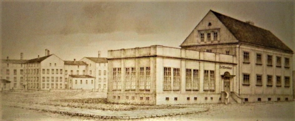 Porzellanfabrik C. & E. Carstens in Sorau um 1930, zeitgenössische Darstellung der Firma in Werbeseiten